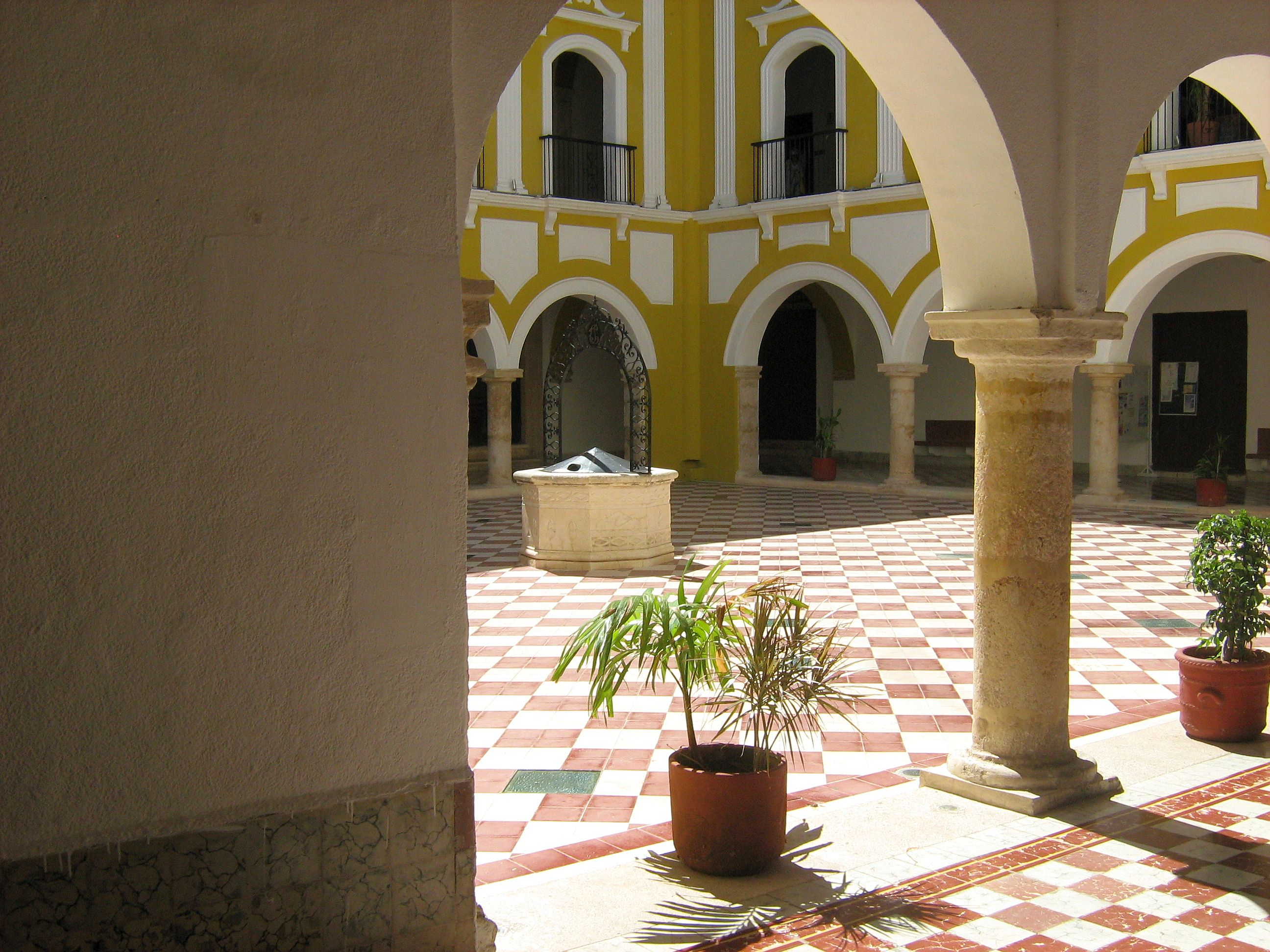 Claustro del Instituto Campechano — en San Francisco de Campeche, estado de Campeche, México.